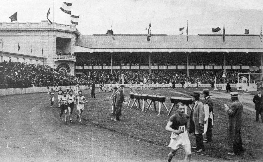 Le départ du marathon aux JO d'Anvers en 1920.